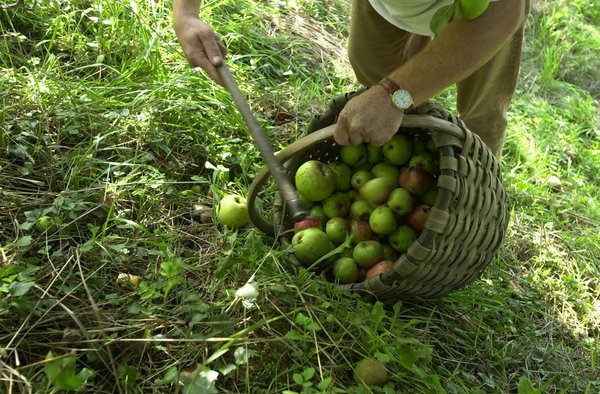 Sagarrak biltzen.